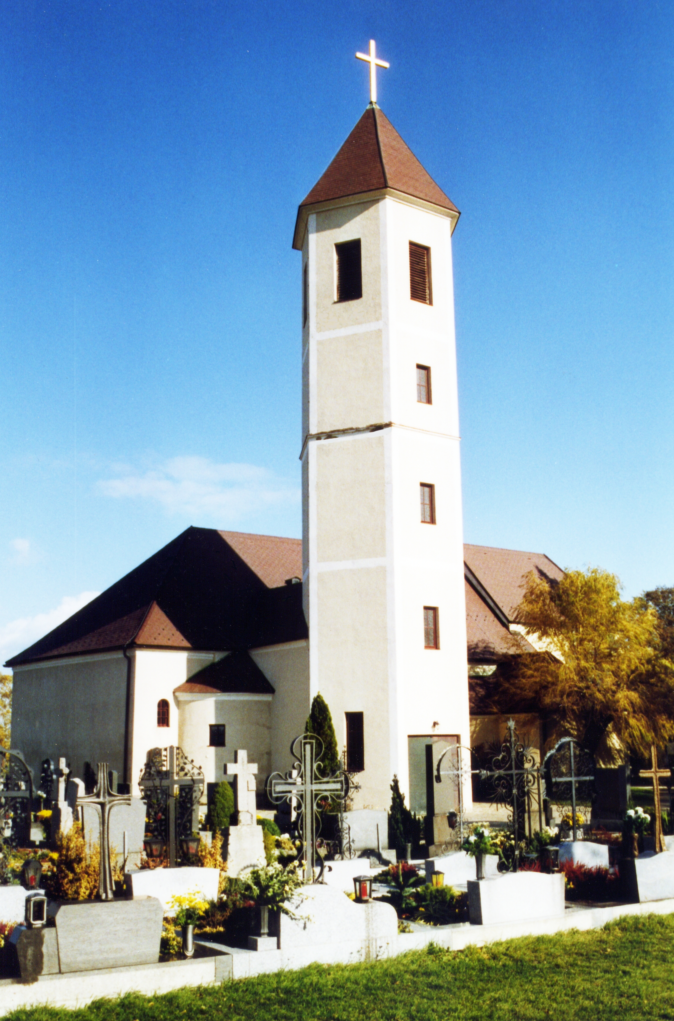 Pfarrkirche Obritzberg, Bezirk St.Pölten-Land, Diözese St.Pölten, Patron: Hl. Laurentius